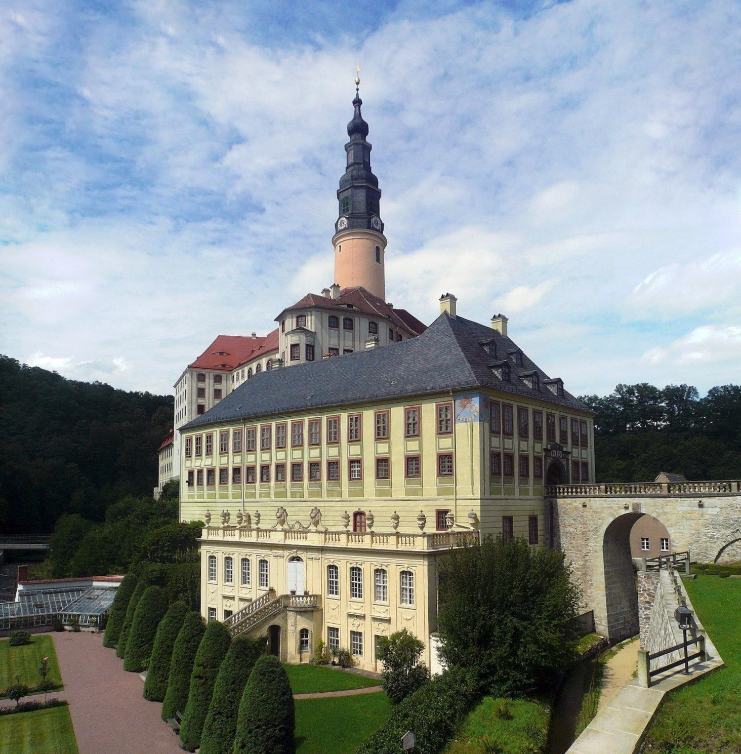 Das Schloss Weesenstein, von Südosten aus betrachtet, erhebt sich südlich von Dresden auf einem Felsvorsprung über dem Tal der Müglitz. Das komplette Bauwerk umfasst eine Bauperiode von etwa 700 Jahre.